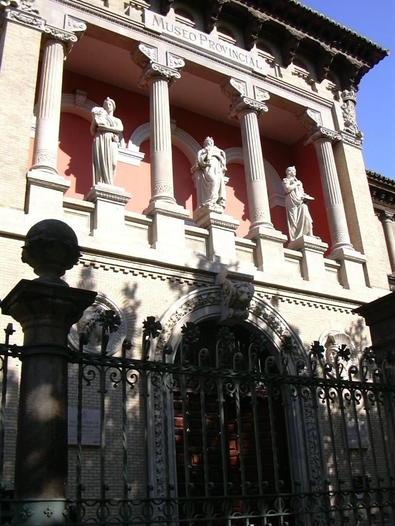 Zaragoza - Muso Provincial - Entrada Edificio neorrenacentista de 1908 proyectado por Ricardo Magdalena